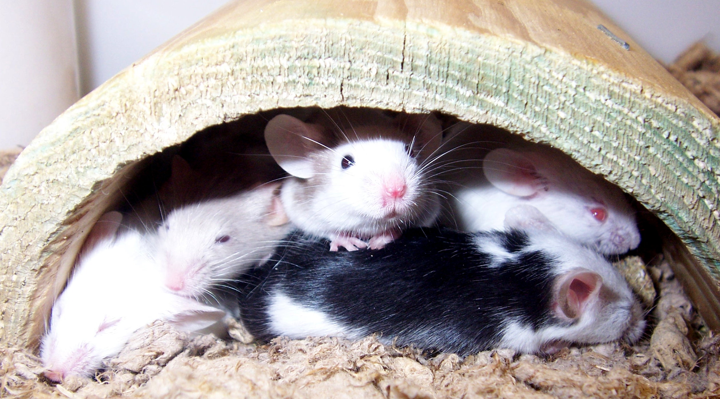 Pet Mice